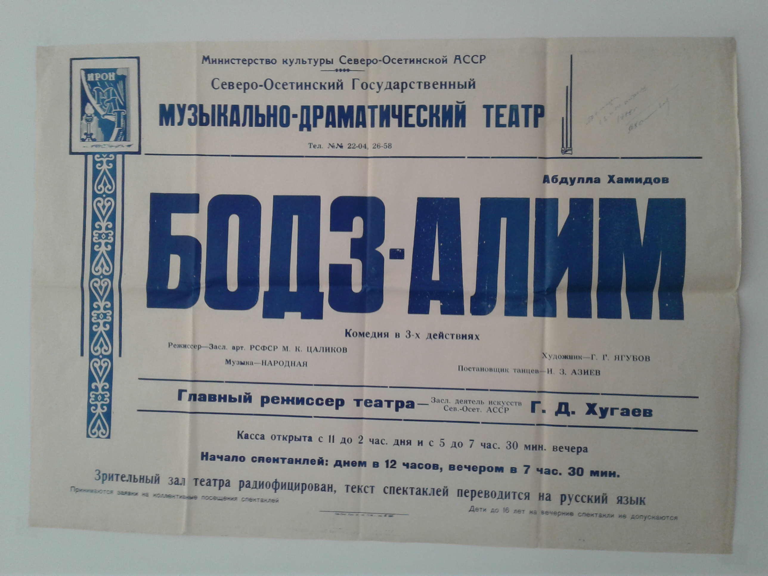 Спектакль Бодз-Алим является осетинской версией спектакля Бож-Али